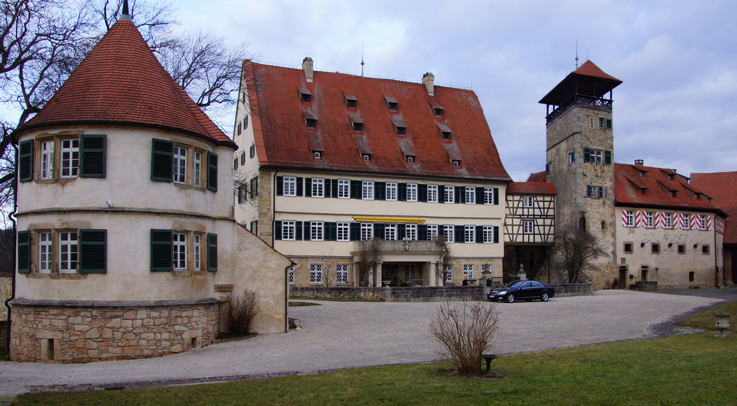 Schloss Tübingen-Kilchberg Unknown